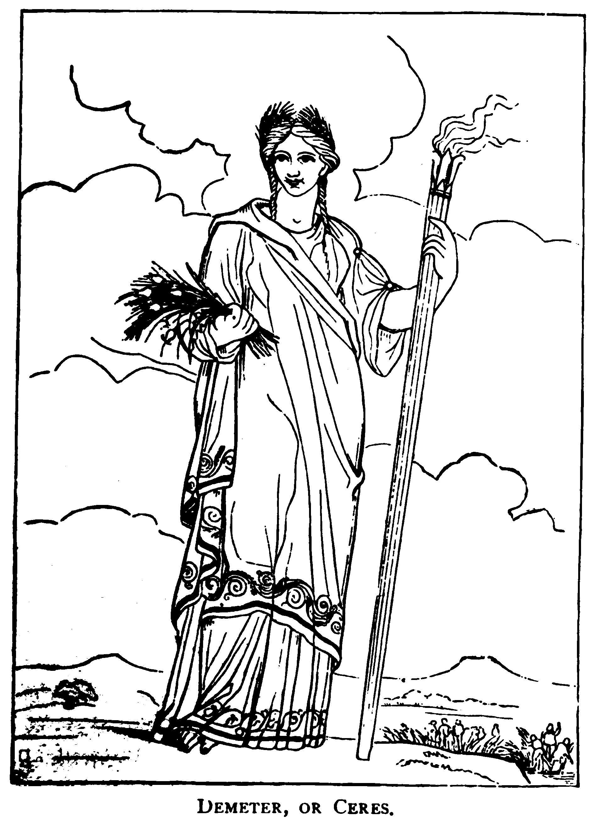 Demeter, or Ceres.